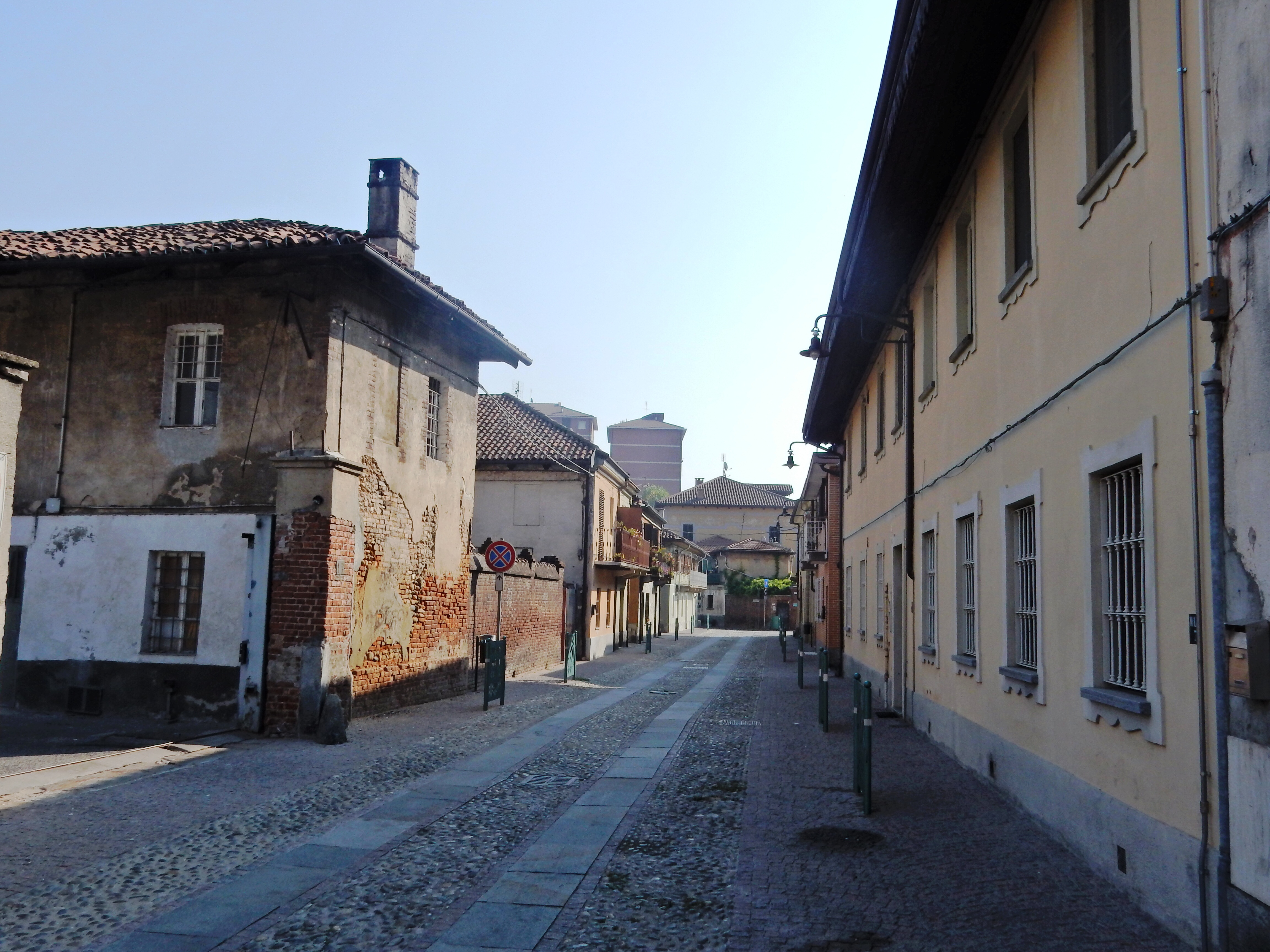 Veduta via centrale borgo storico di Mirafiori